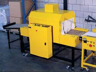 Krimptunnel